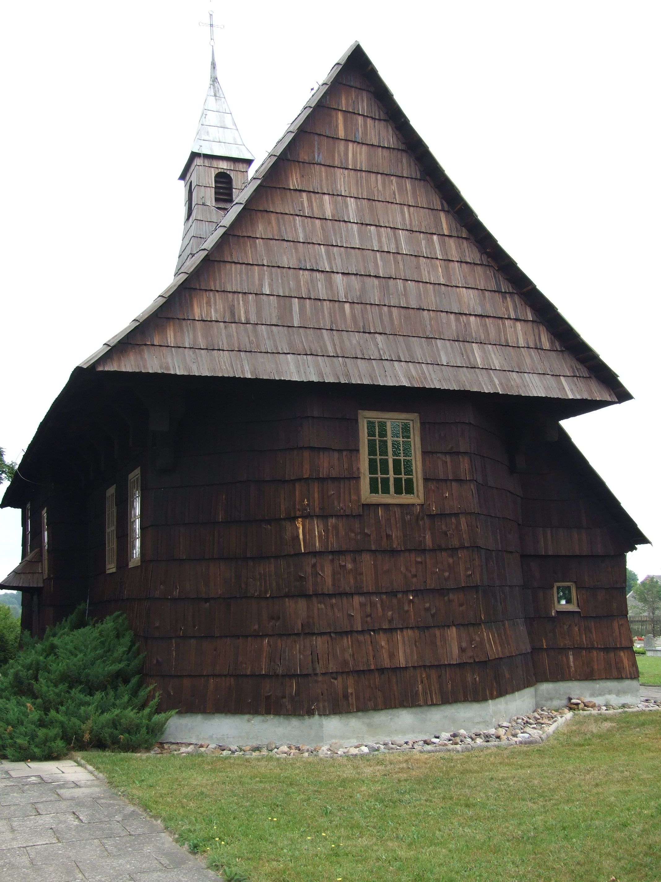 Kościół św. Antoniego z Padwy w Sowczycach